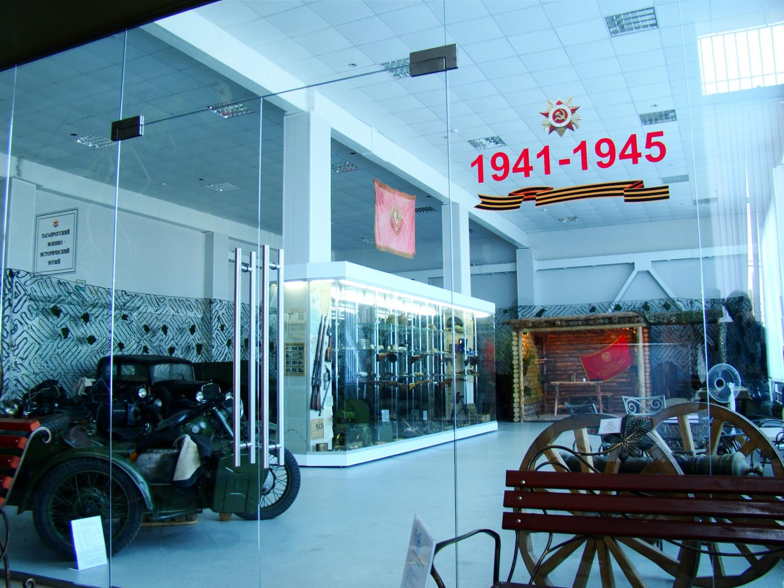 Вход в Таганрогский военно-исторический музей